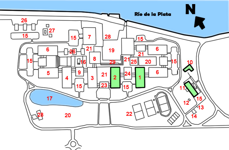 Proyecto original de la Ciudad Universitaria de la Universidad de Buenos Aires, realizado en 1959. Marcados en verde, los únicos edificios que fueron construidos finalmente. Referencias: 1 Facultad de Ciencias Exactas y Naturales 2 Facultad de Arquitectura y Urbanismo 3 Facultad de Ingeniería 4 Facultad de Ciencias Económicas 5 Facultad de Agronomía y Veterinaria 6 Expansiones 7 Facultad de Derecho y Ciencias Sociales 8 Biblioteca 9 Educación Física 10 Departamento de Industria 11 Departamento de Física Matemática 12 Vivienda 13 Planta de Gas 14 Subestación Eléctrica 15 Estacionamientos 16 Alberca 17 Lago Artificial 18 Laboratorio de Hidráulica 19 Explanada 20 Campo Experimental 21 Plazas 22 Área Deportiva 23 Rectoría 24 Auditorio 25 Casa Estudiantil 26 Viviendas 27 Escuelas Primaria y Secundaria 28 Jardín 29 Rampa